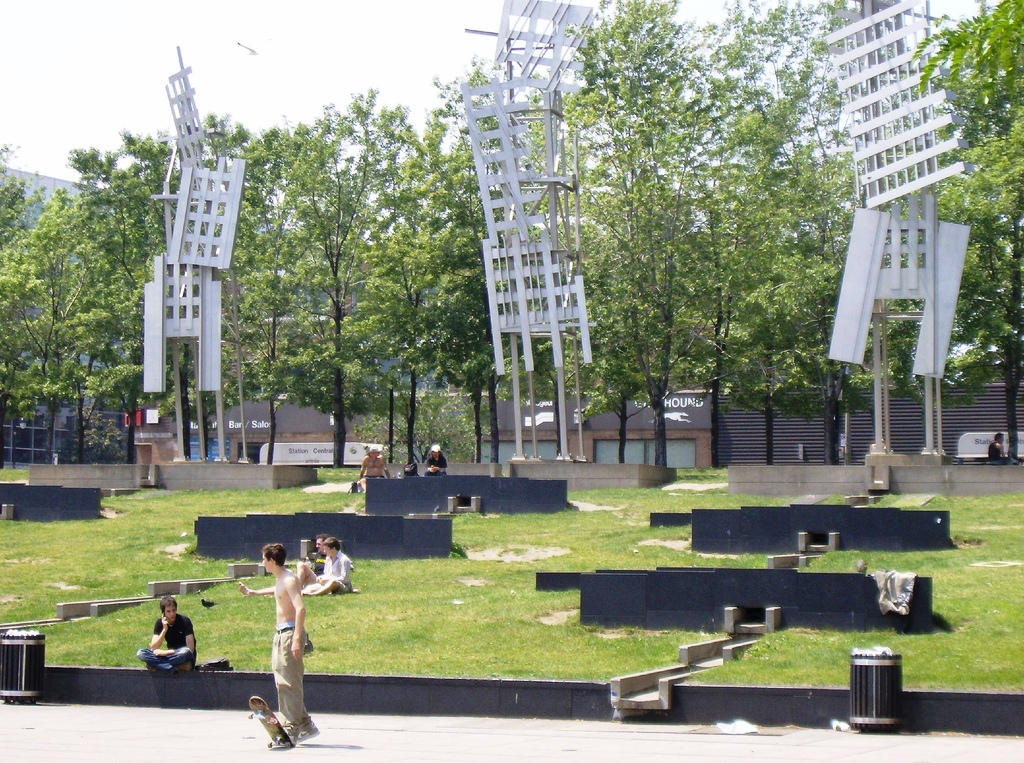 Sculptures in Montreal/Canada.